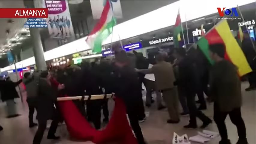 Almanya’da Hannover Havaalanı’nda Türkiye’nin Afrin’e yönelik Zeytin Dalı Operasyonu yüzünden arbede yaşandı.